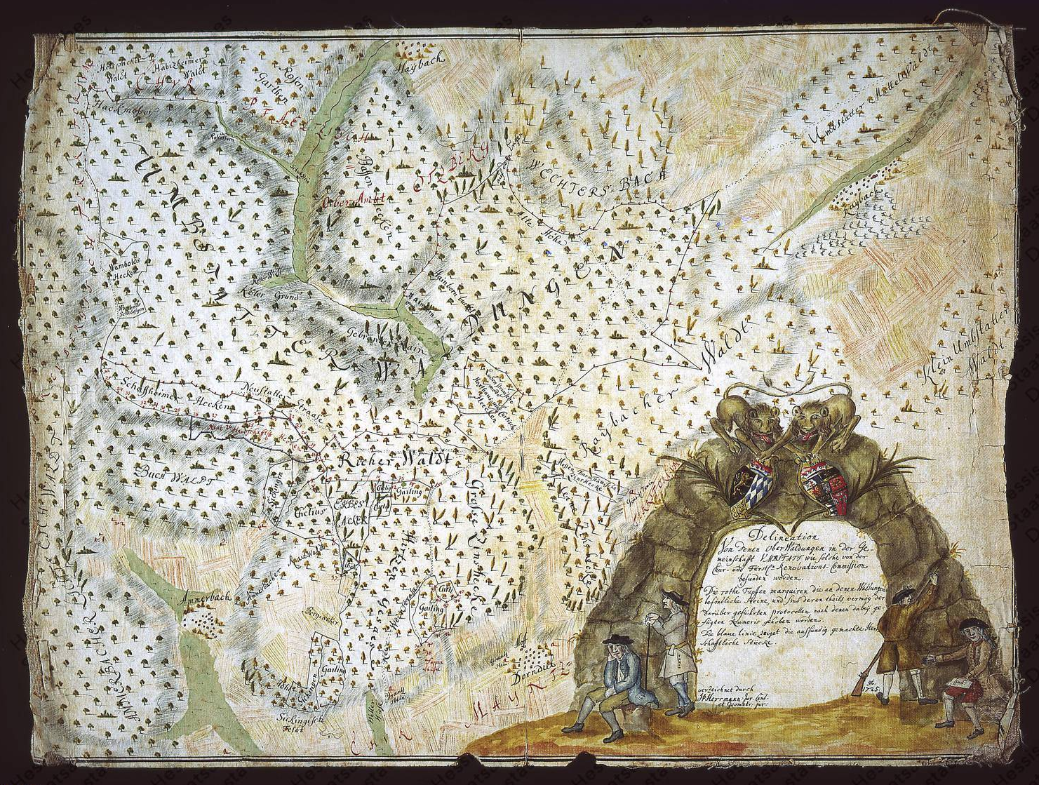 Geometer-Karte der Waldungen des Oberamtes Umstadt zur Zeiten des Kondominates. Das Gebiet umfasst etwa den Höhenzug der Hohen Straße zwischen Wamboltschen Schlösschen, Heubach, Raibach, Dorndiel und Wald-Amorbach. Ländereien der von Curti, Wambolt von Umstadt, Gayling von Altheim, der von Sickingen und Haxthausen sind eingezeichnet. Originaltitel: Delineation von denen Oberwaldungen in der Gemeinschaft Umstadt, wie solche von der Kur- und Fürstlichen Renovationskommission befunden worden (Karte der Oberwaldungen in dem gemeinschaftlichen kurpfälzisch- und hessen-darmstädtischen Oberamt Umstadt mit Ortslagen von Dorndiel, Raibach, Wald-Amorbach und Heubach). Man beachte: oben ist hier Westen (und zeigt zum Zent-Hauptort Umstadt)